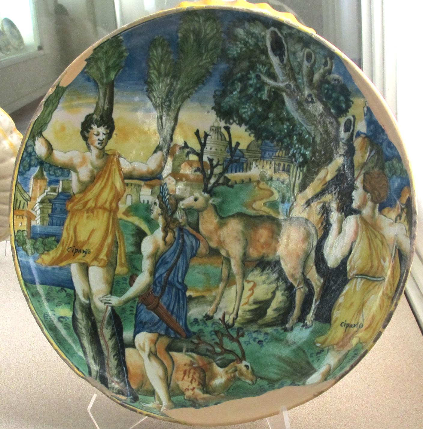 Museo Nazionale d'Arte Medievale e Moderna - MIBAC This is a photo of a monument which is part of cultural heritage of Italy.